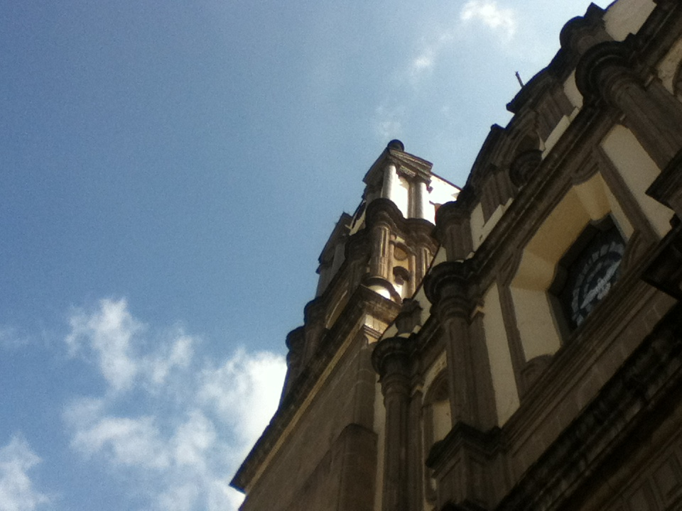 Torre y Fachada actual de la Catedral